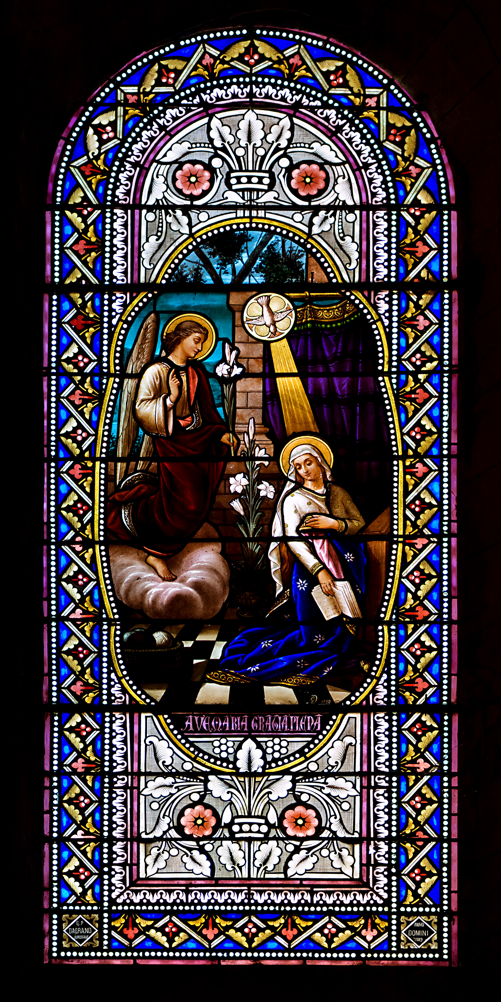 Un des vitraux de l'église de l'Assomption-de-Notre-Dame à Quarante (France) .